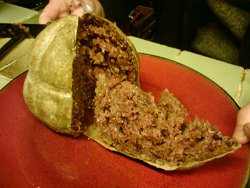 Salama da sugo, specialità ferrarese. Vedi altre imaggine qui